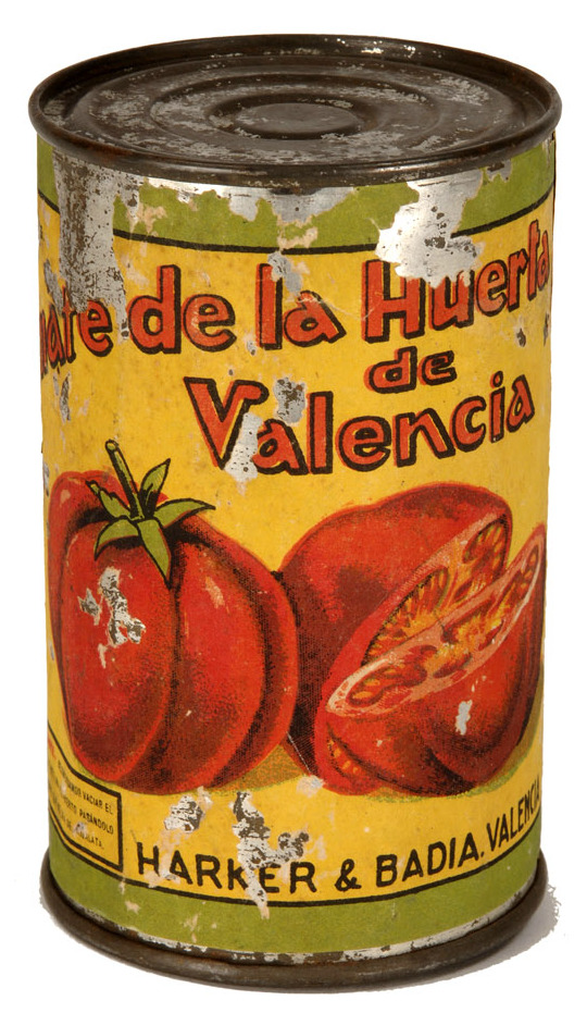 Fotografies dels objectes de l'exposició permanent de la sala "Secà i Muntanya" del Museu Valencià d'Etnologia - Fotografies de Mateo Gamon. Tomata envasada de la marca Harker & Badia de València, anys 20.